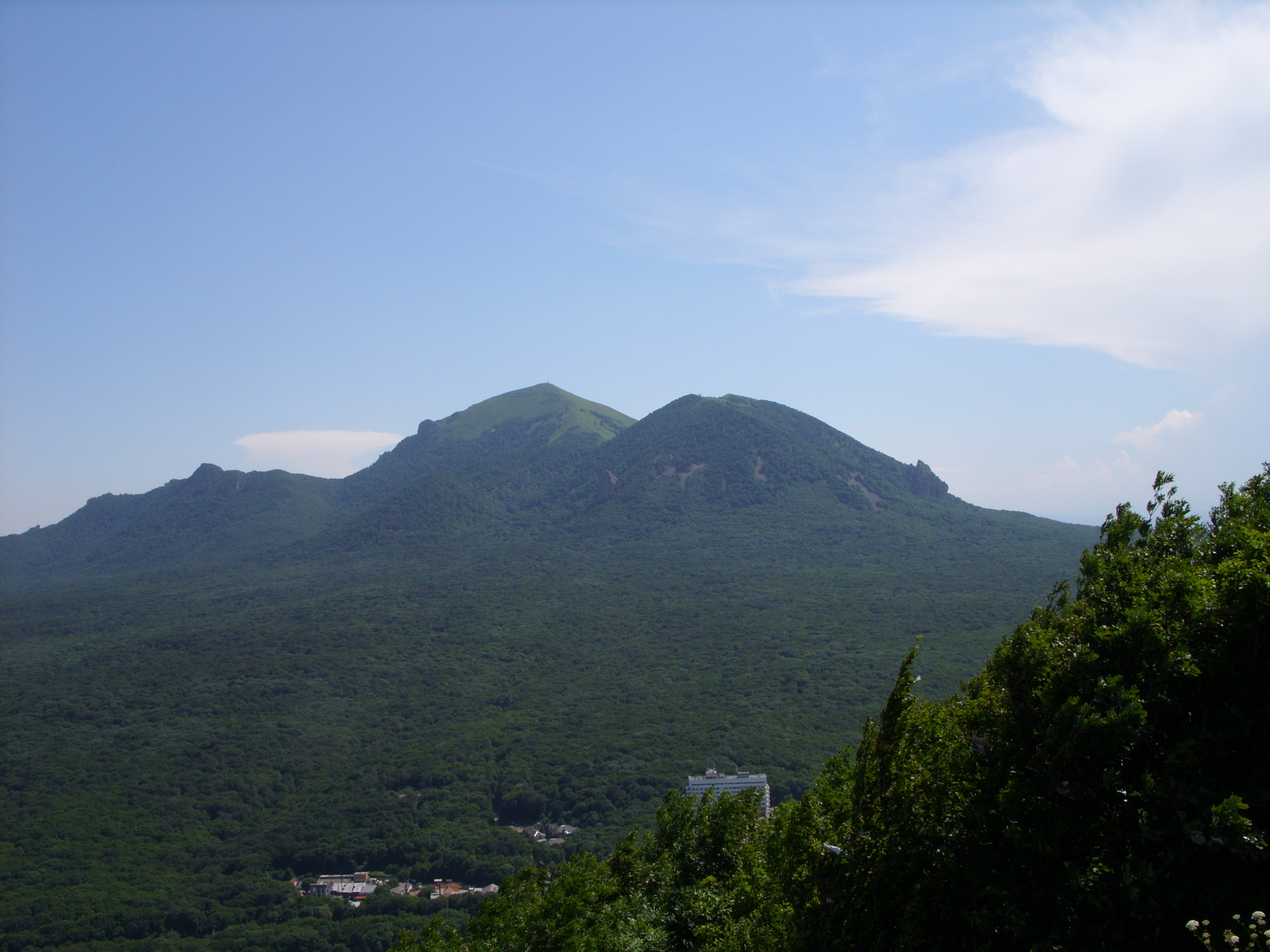 снимок июля 2009 г.